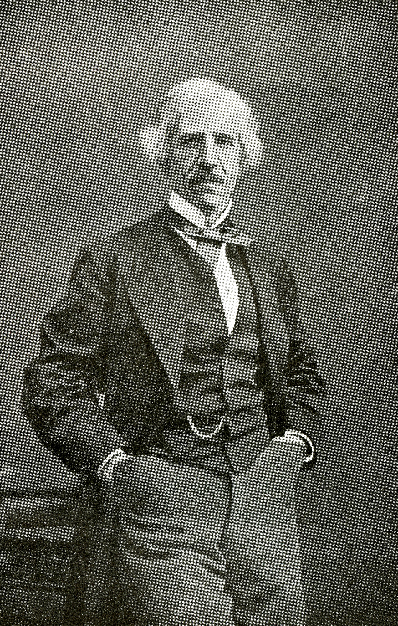 Portrait Photographique.